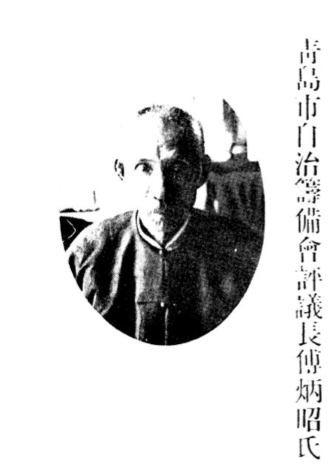 傅炳昭，黄县人，实业家